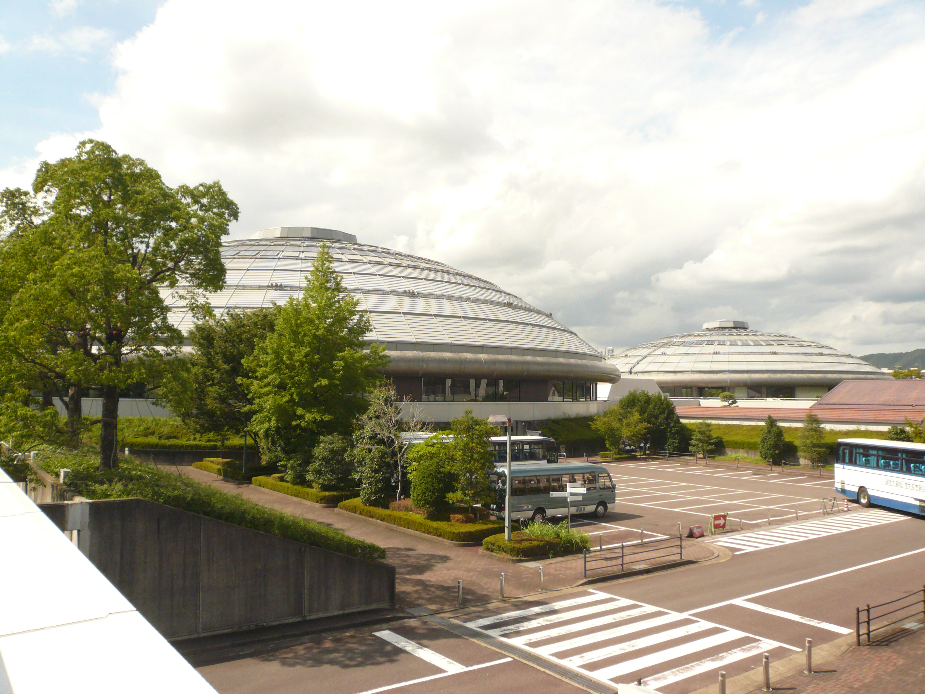 Gifu Memorial Center Deai dome & Fureai dome（岐阜メモリアルセンター）,Gifu,Gifu(岐阜県岐阜市)で撮影。で愛ドームとふれ愛ドーム